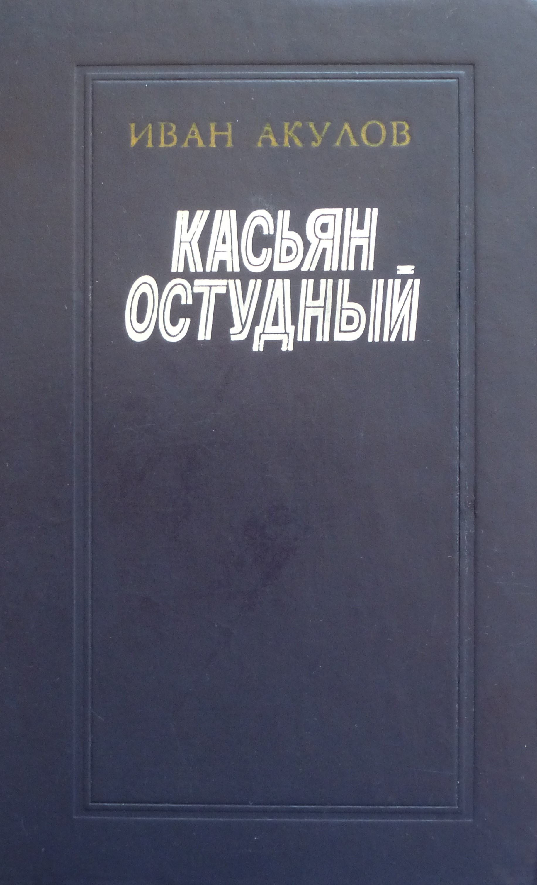 Обложка книги